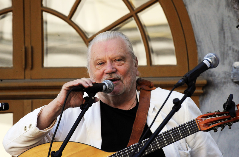 Pierre Ström